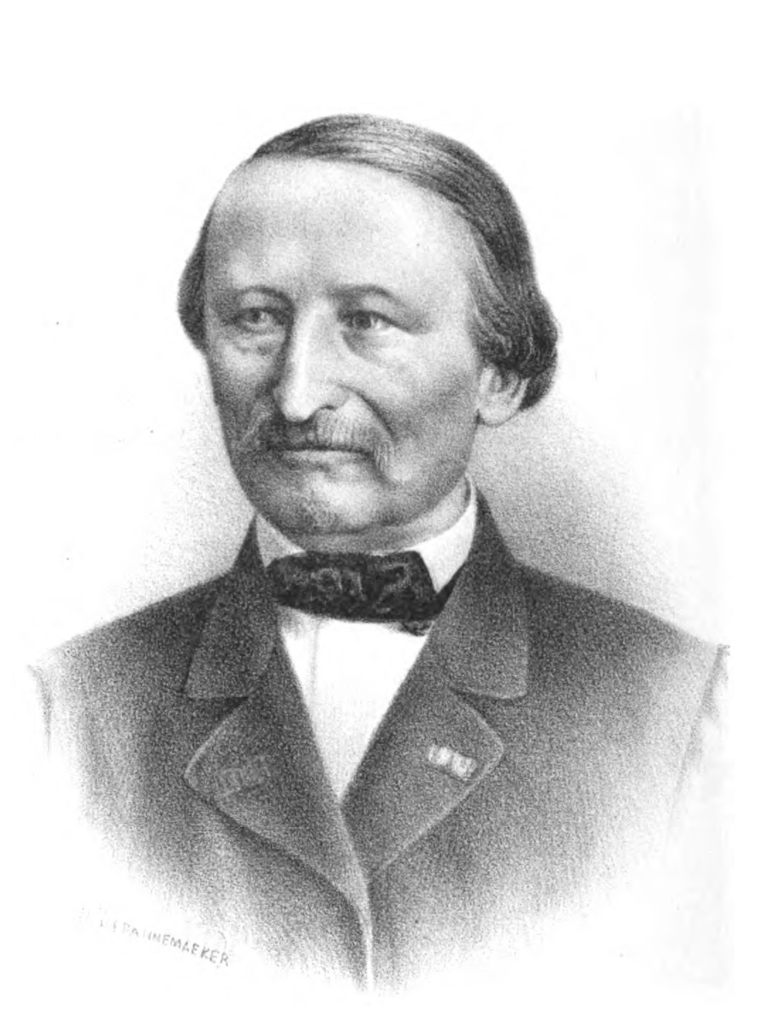 Portrait d'Alexandre Bivort (horticulteur, pomologue).